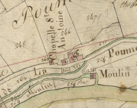 La Poma, d'Oleta, en el Cadastre napoleònic del 1812 (Arxius Departamentals dels Pirineus Orientals)